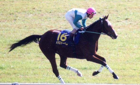 メジロドーベル 撮影日: 1999年11月21日 撮影場所: 東京競馬場（引退式） 撮影者: Goki